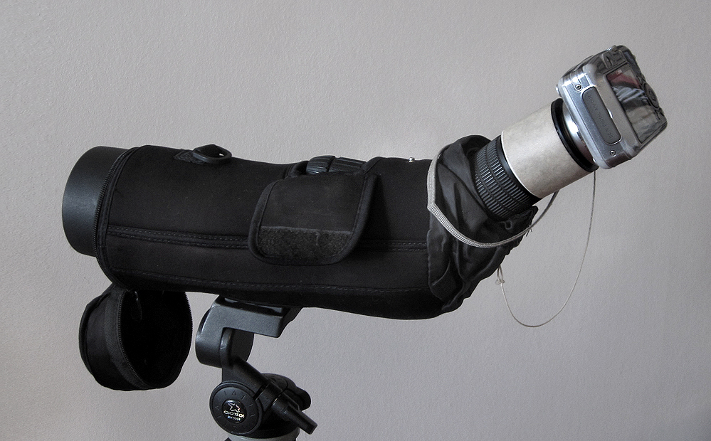 Digiscope adapter men kamera på en tubkikare.